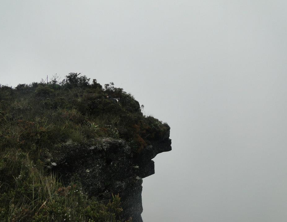 Piedra Cara del indio